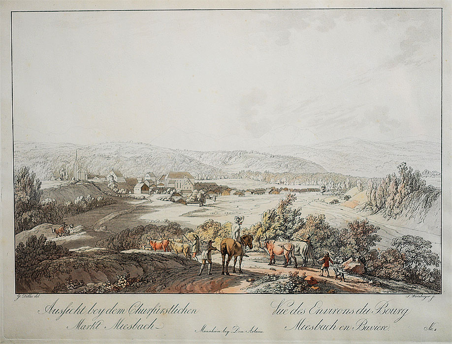 Aussicht bey dem Churfürstlichen Markt Miesbach, Radierung aus: Zwölf Ansichten von Bayern, Mannheim, bei Domenico Artaria, um 1805